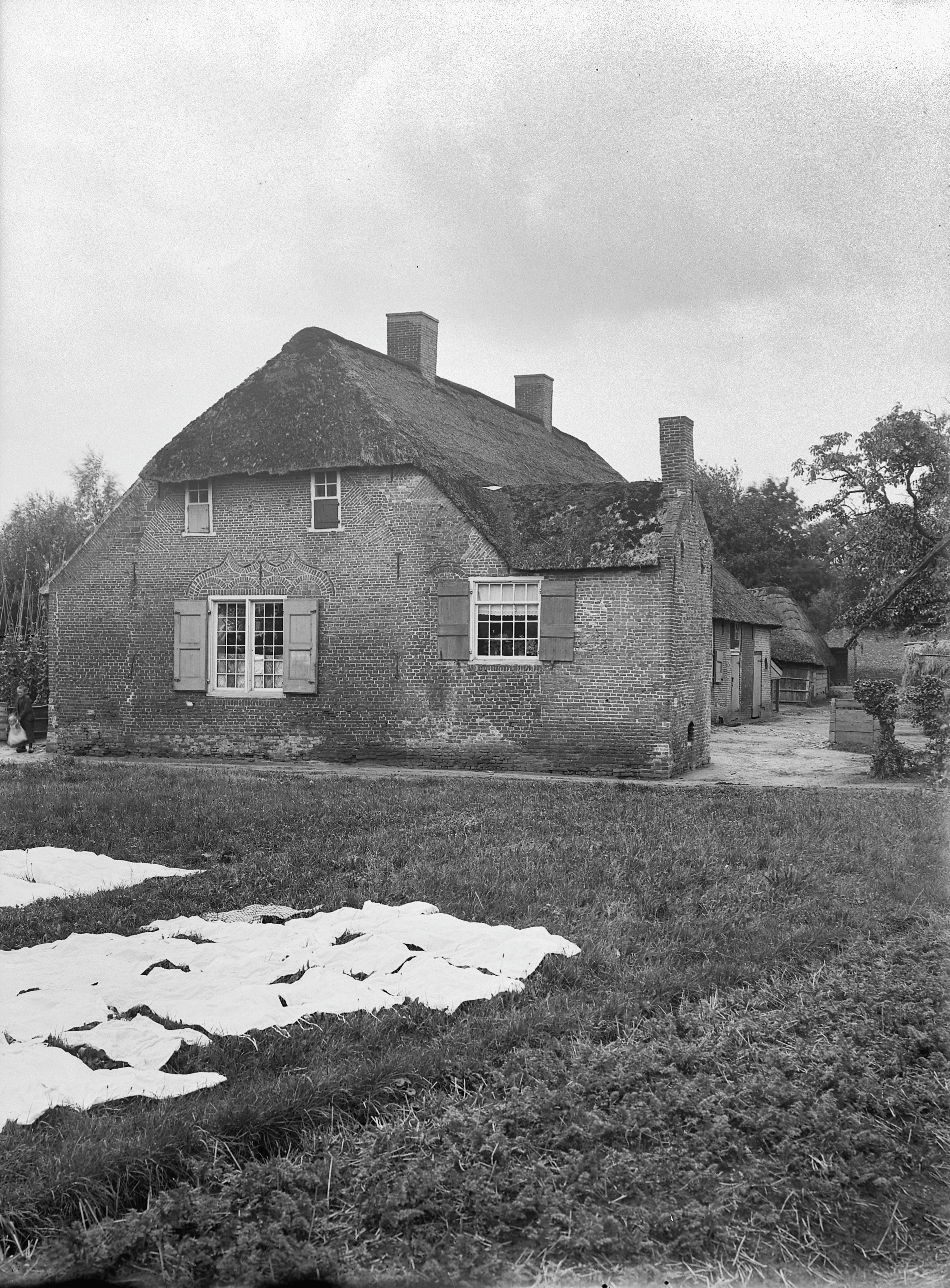 Boerderij: Overzicht boerderij met bleekveld